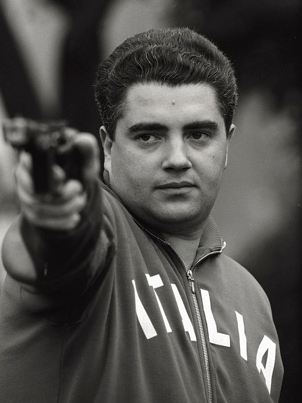 Giovanni Liverzani, 1964 Olympics